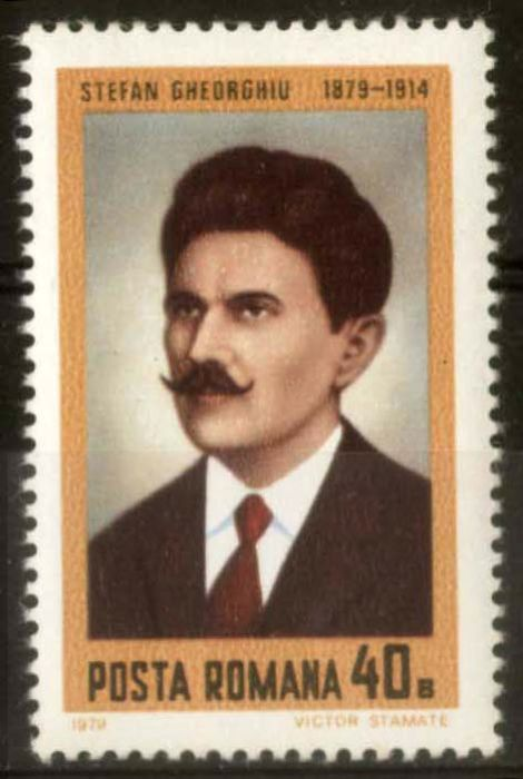 Gheorghiu, Stefan (1879–1914), militant socialiste et syndicaliste roumain